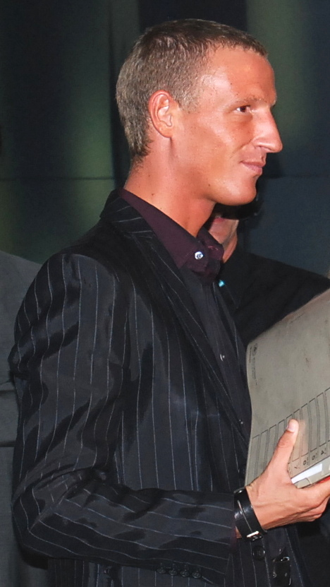 Stefan Petzner, Kandidat des BZÖ für die Nationalratswahl 2008